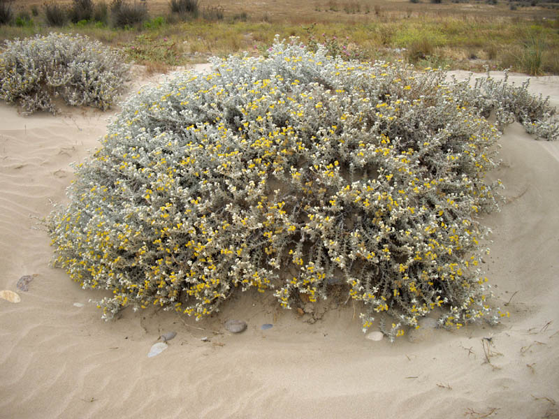 Otanthus maritimus